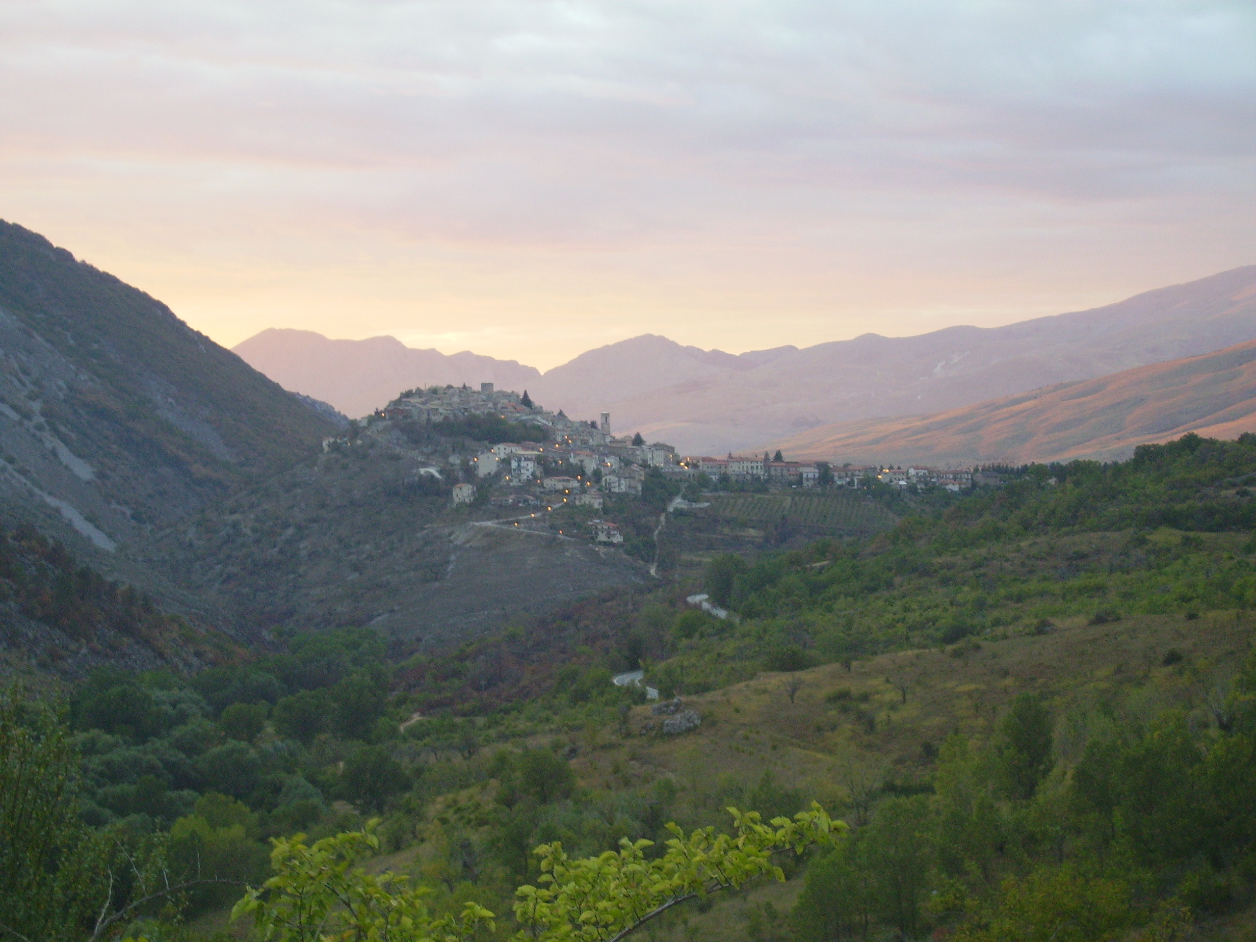 TramontOrtona